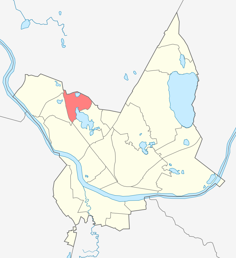 Микрорайон Средняя Погулянка карте Даугавпилса.